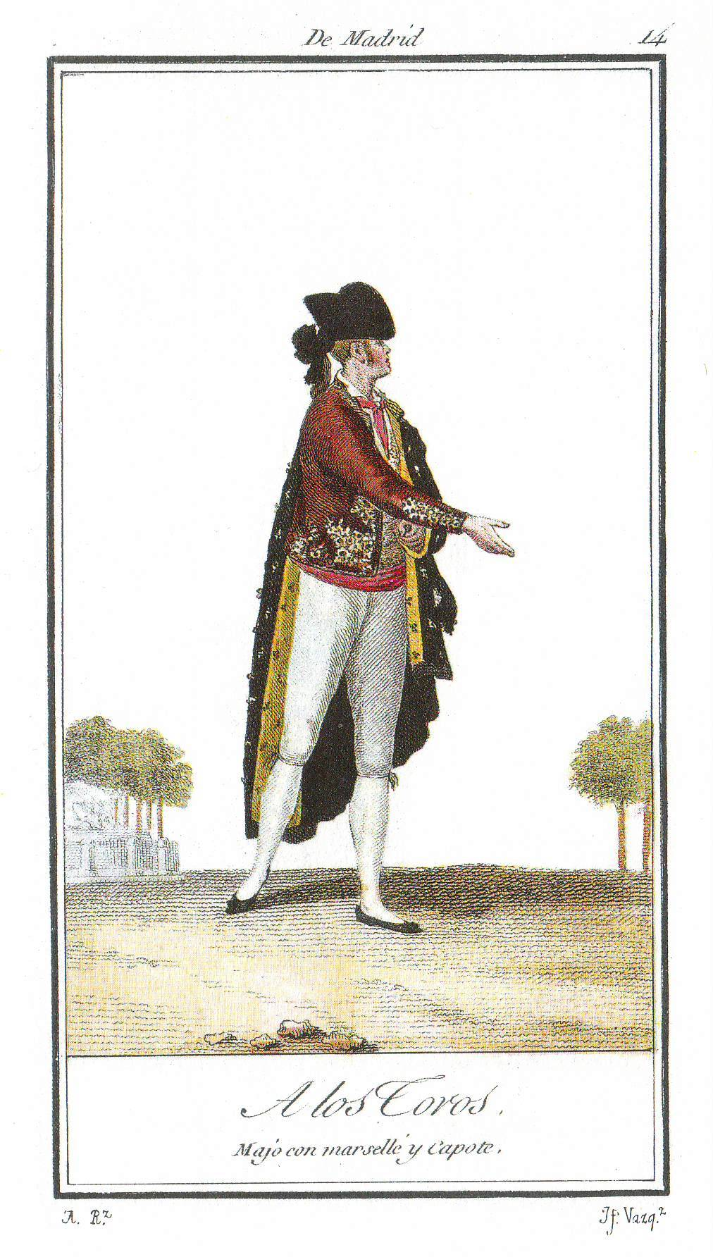 Antonio Rodríguez (1765–1823) Alternative names Antonio RodríguezDescriptionSpanish engraver and painterDate of birth/death 1765 1823 Location of birth/death Valencia ValenciaWork location Madrid. ValenciaAuthority control : Q19839243 VIAF: 99638871 ISNI: 0000 0001 0928 4589 ULAN: 500037980 LCCN: n83012058 GND: 143185209 WorldCat creator QS:P170,Q19839243 (Valencia, 1765 - Madrid, ca. 1825); Grabado y dibujado por Antonio Rodríguez; publicado en 1801. Reproducción facsímil de treinta y ocho estampas, más catorce variantes, de los Trajes de Madrid. Todas iluminadas. Introducción de Juan Carrete Parrondo, Madrid (1989). ISBN 84 78120696.